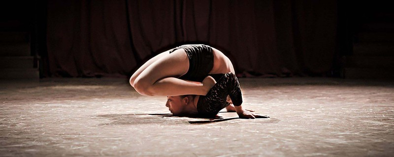 Elodie guezou en figure de la crevette